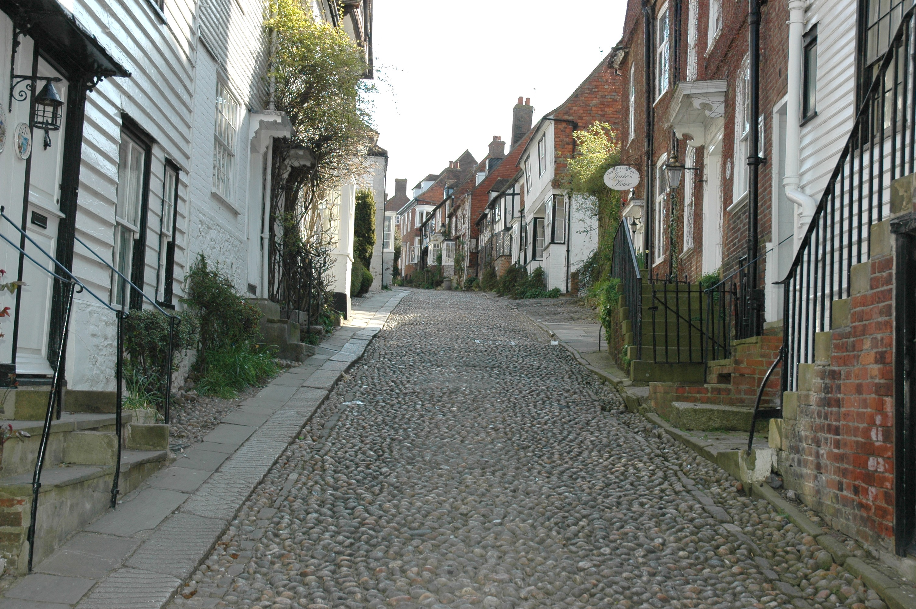 Rye - carrer